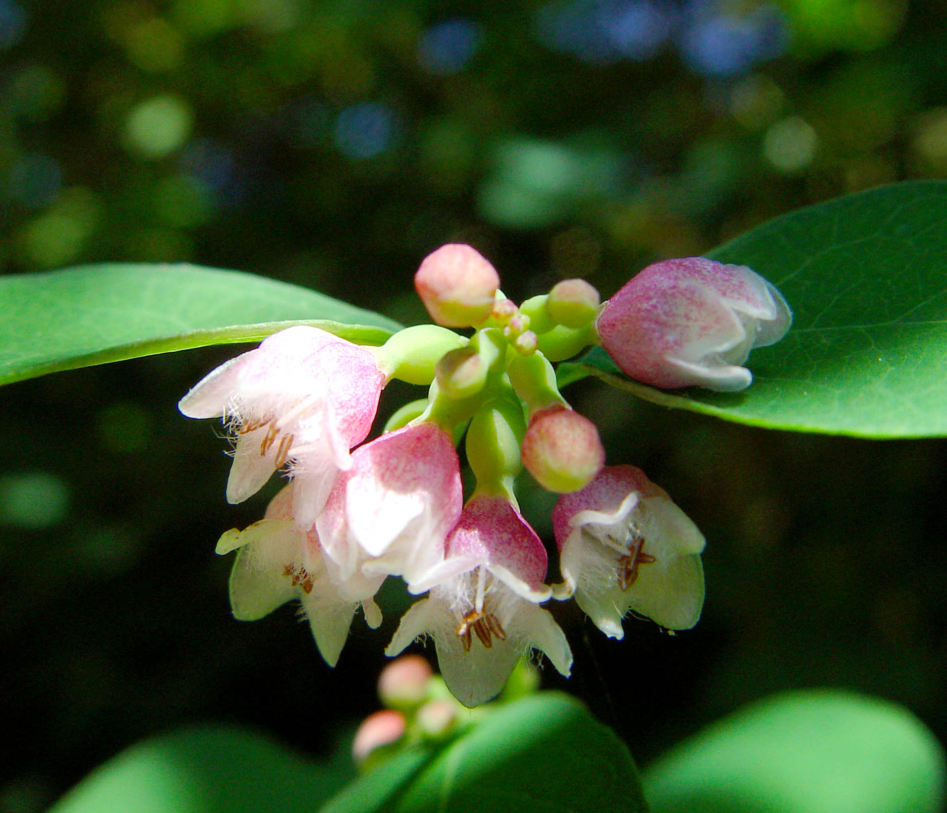 Beschreibung: Blüten der Schneebeere oder Knallerbse (Symphoricarpos albus) Aufnahmedatum: 26. Juni 2005 Fotograf: ArtMechanic